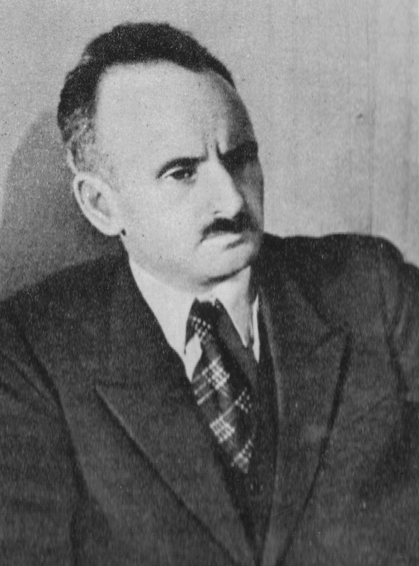 Adolf Berman